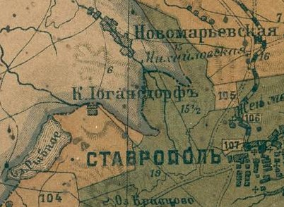 Фрагмент «Карты Ставропольской губернии составленной при ставропольской губернской чертёжной по новым сведениям по указаниям и под непосредственным наблюдением ставропольского губернатора, генерал-майора Н. Е. Никифораки в 1896 году»